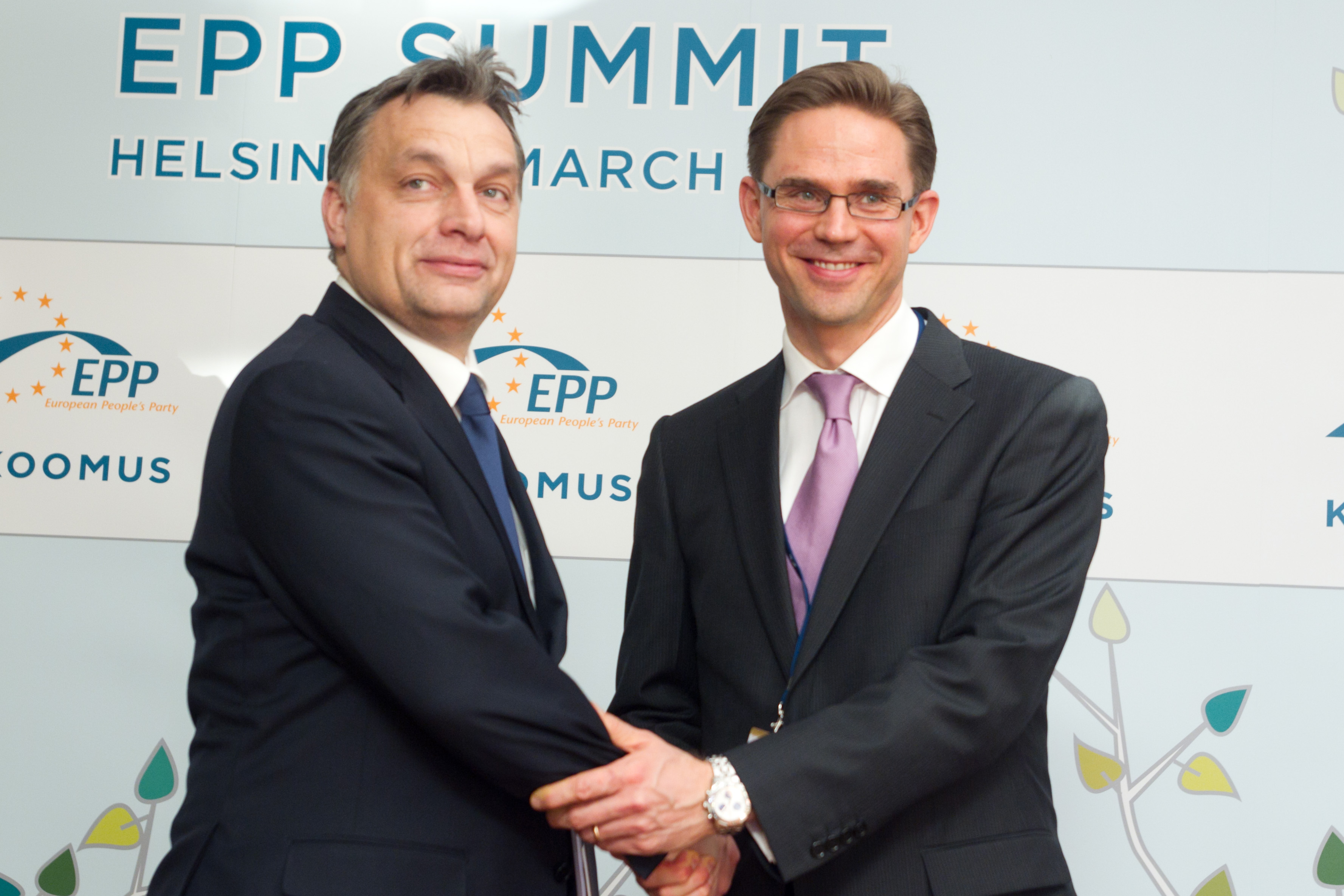 Viktor Orbán and Jyrki Katainen . Photo: Mauri Ratilainen / Compic